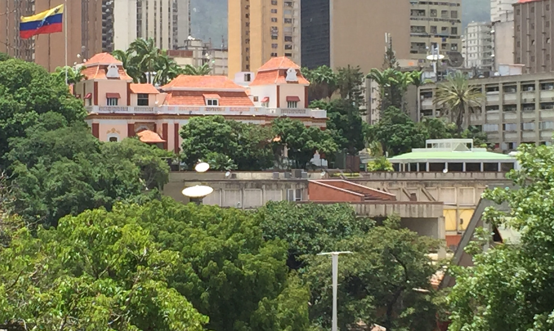 Palacio de Miraflores dede el parque de El Calvario.